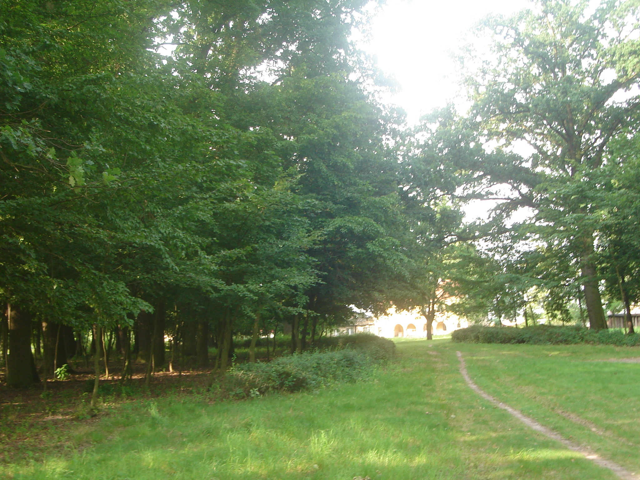 Park w Kolicy (gm. Brudzew); w tle wozownia